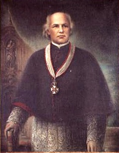 Christoph Moufang (1817-1890) Domherr und Diözesanverweser in Mainz